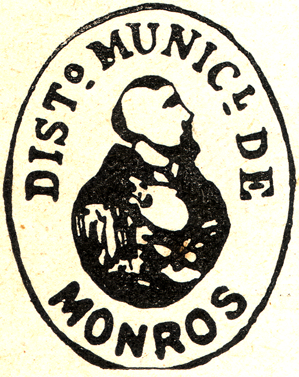 Segell municipal antic de Mont-ros (la Torre de Cabdella, Pallars Jussà)